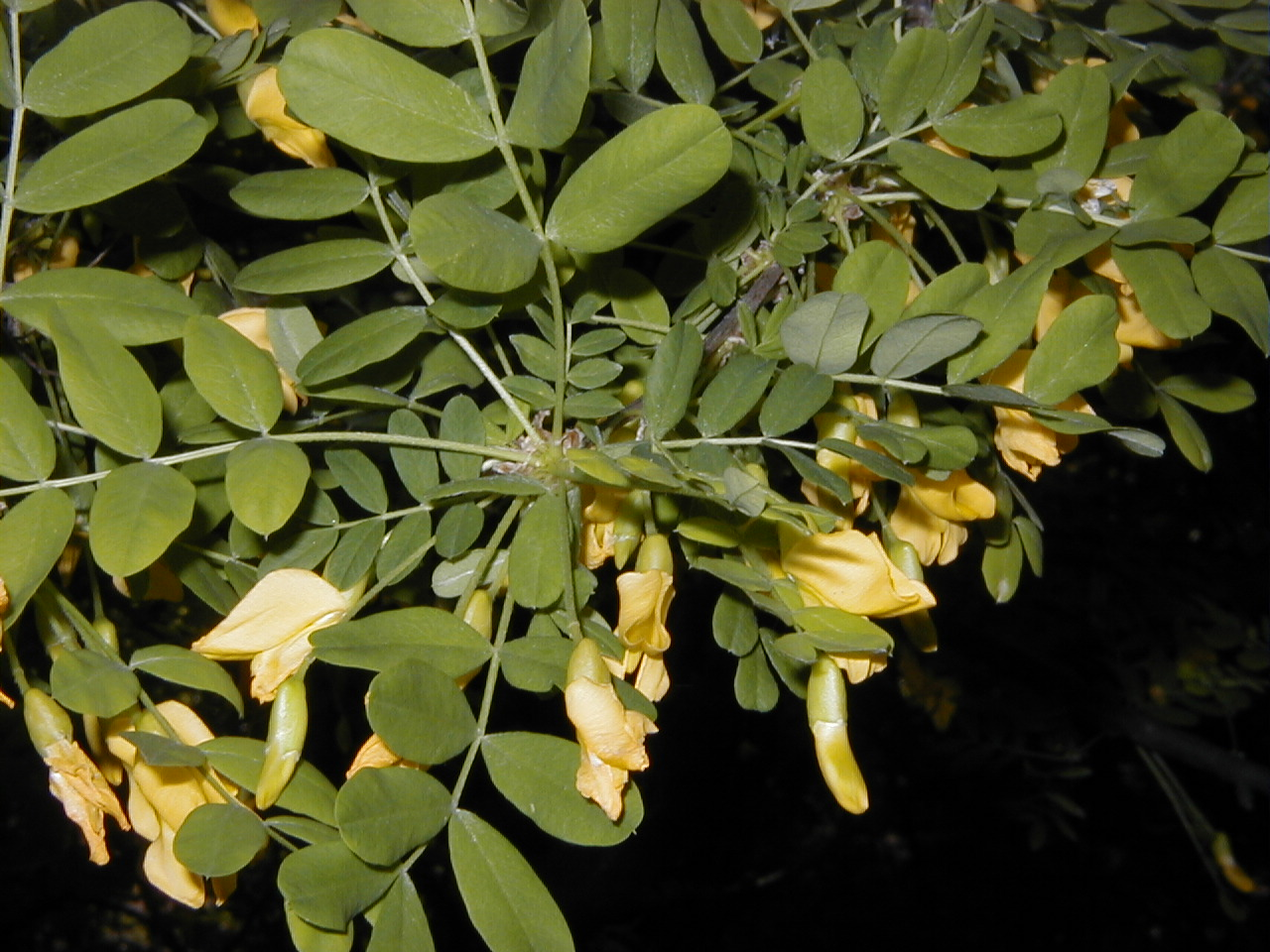 Caragana arborescens. Real Jardín Botánico, Madrid.